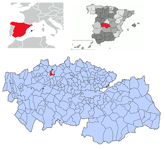 Garciotum en la provincia de Toledo